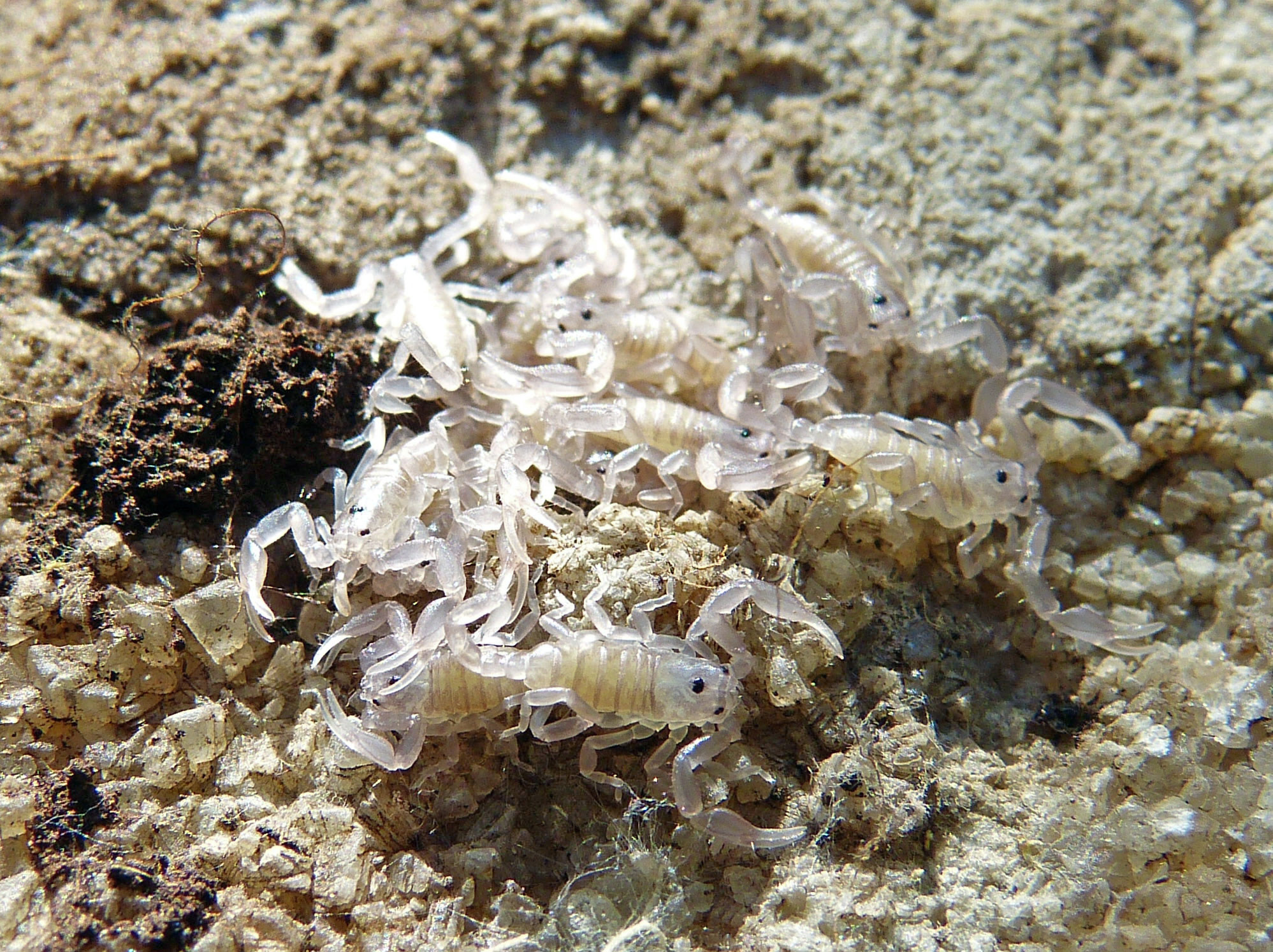 Giovanissimi esemplari di Euscorpius sp., genere di Scorpioni comuni in Italia, fotografati sotto un masso. Da notare come da giovani stiano ammassati per potersi proteggere più agevolmente. Parco nazionale dei Monti Sibillini (Q1425191)